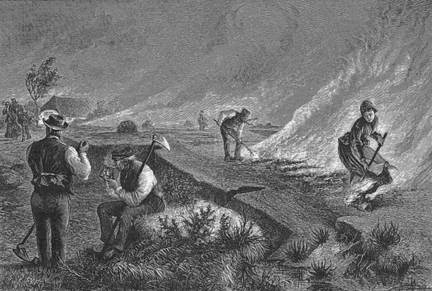 Protestprent, verschenen als bijlage bij de Illustrierte Zeitung no. 1819 – 11 mei 1878 (Bremen). De houtgravure laat de werkzaamheden bij het veenbranden zien. Links op afbeelding wandelen burgers met opgetrokken neus en van afschuw vervuld langs de brandende venen. (Origineel in de bibliotheek van de Ostfriesische Landschaft te Aurich)